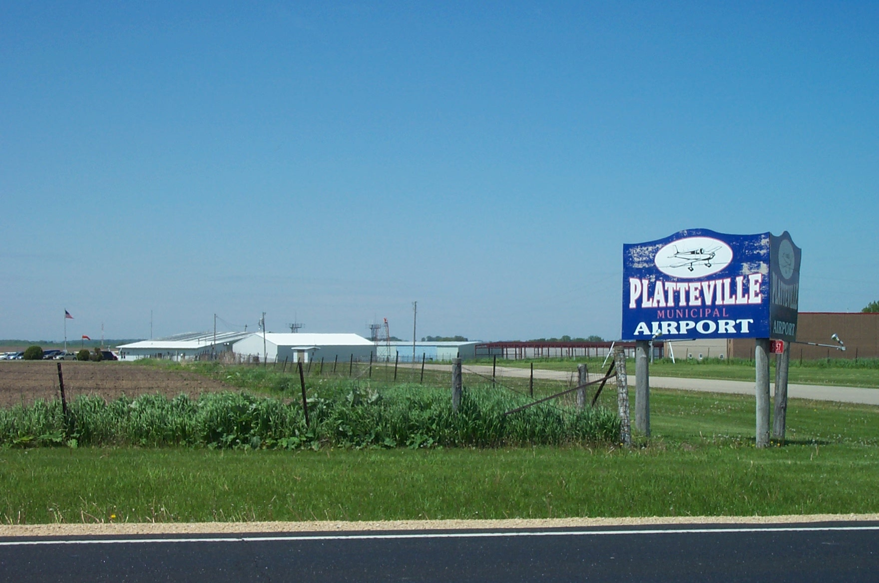 Platteville_Municipal_Airport entrance